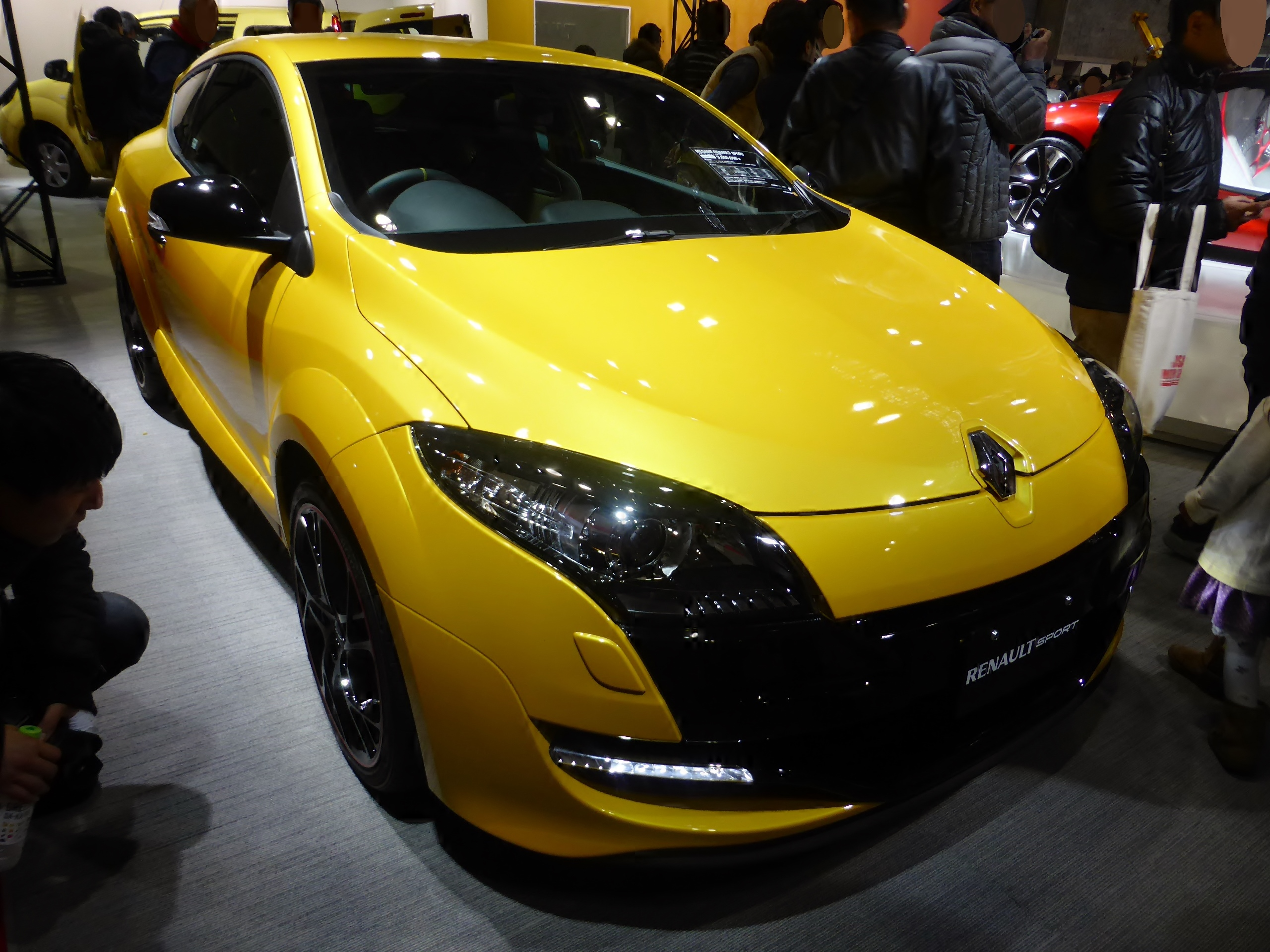 大阪モーターショー2013のルノーブースにおいてメガーヌIIIルノースポールを撮影。